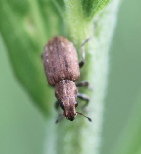 Sitona puncticollis am 8. Juni 2018 in der Schwetzinger Hardt